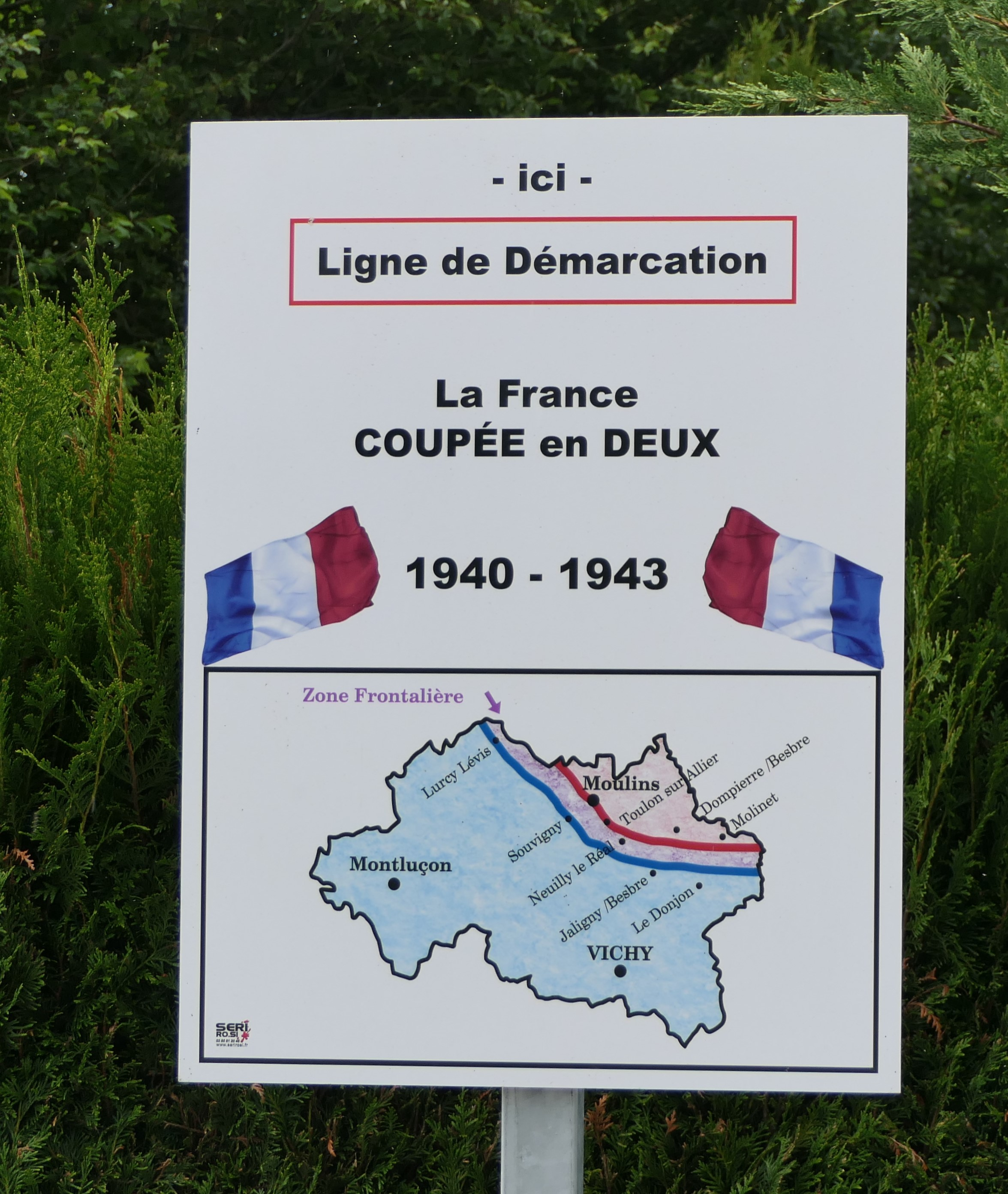 Molinet, panneau indiquant la limite de la ligne de démarcation (1940-1943)